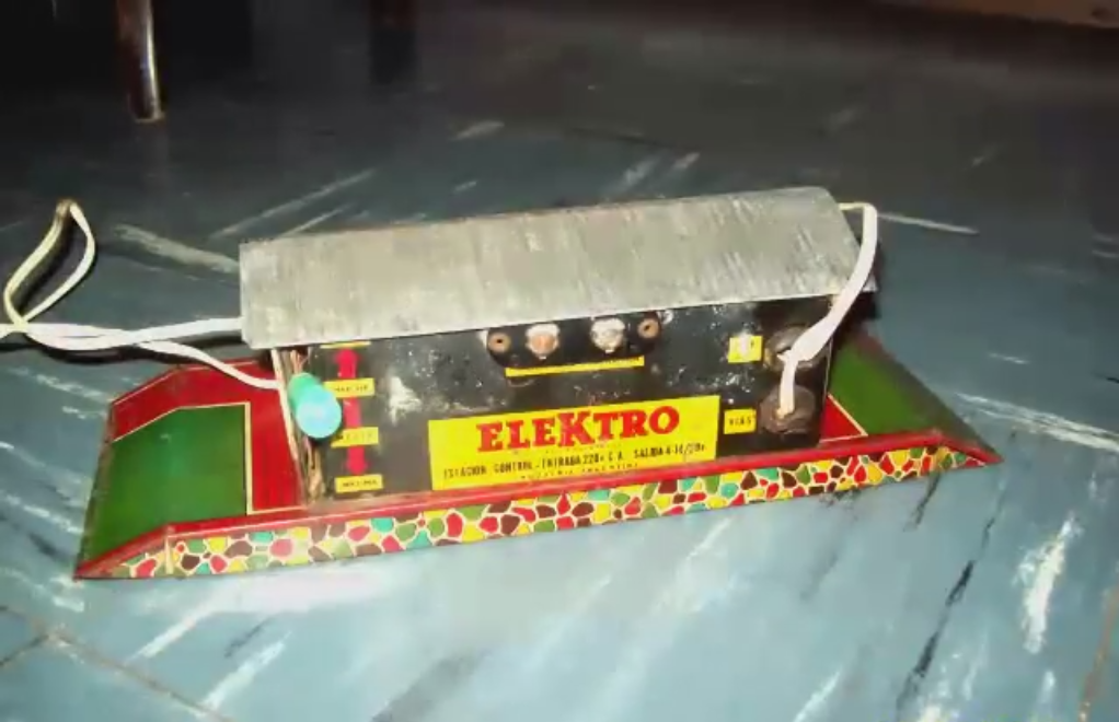 Transformador Elektro de hojalata